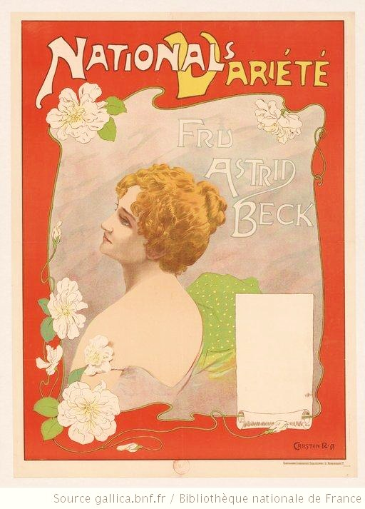 National's Variété - Fru Astrid Beck, affiche de Carsten Ravn lithographiée en 1897 à Copenhague.